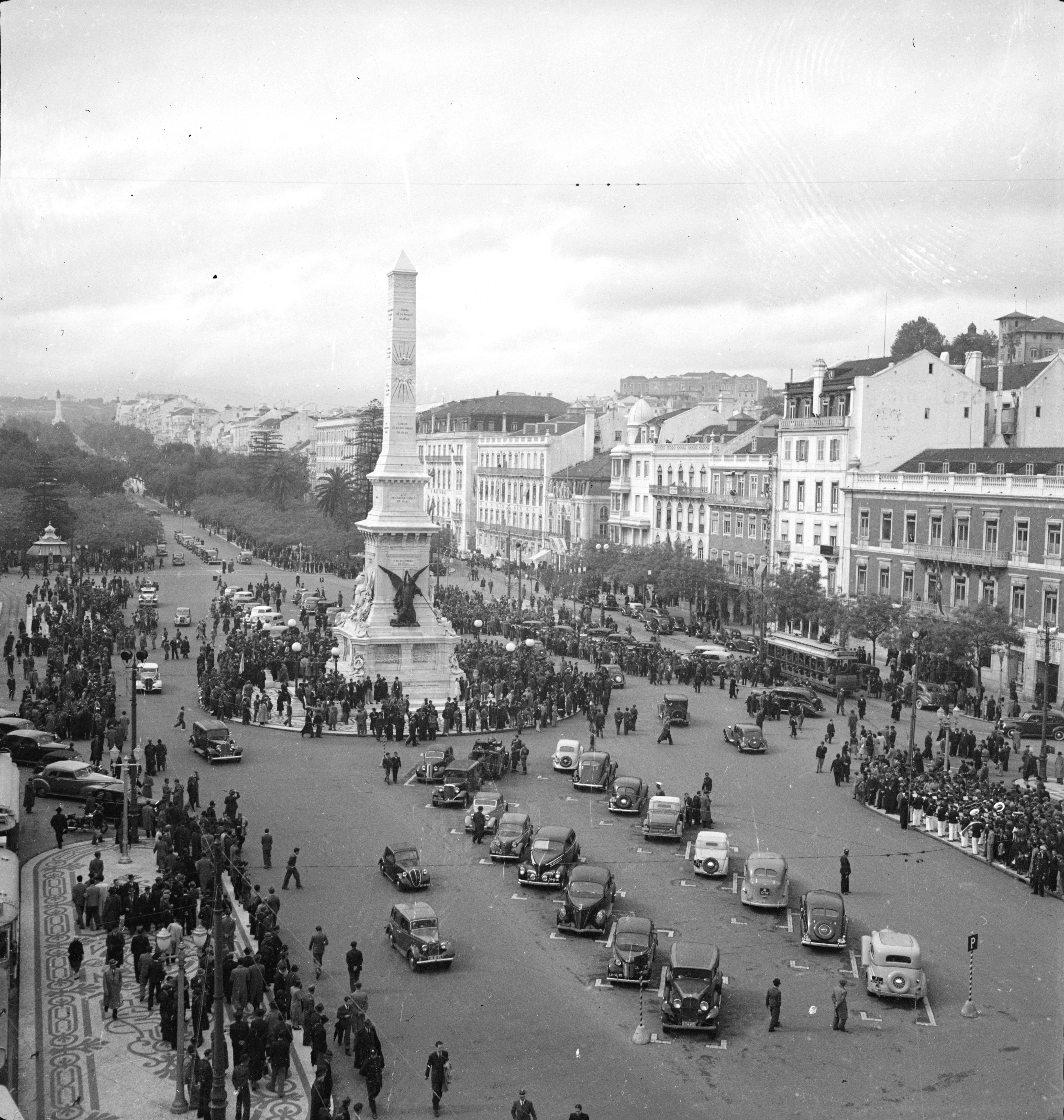 Portugal, Lissabon (Lisboa): Strassenszenen; Eine belebte Strasse mit einer Säule